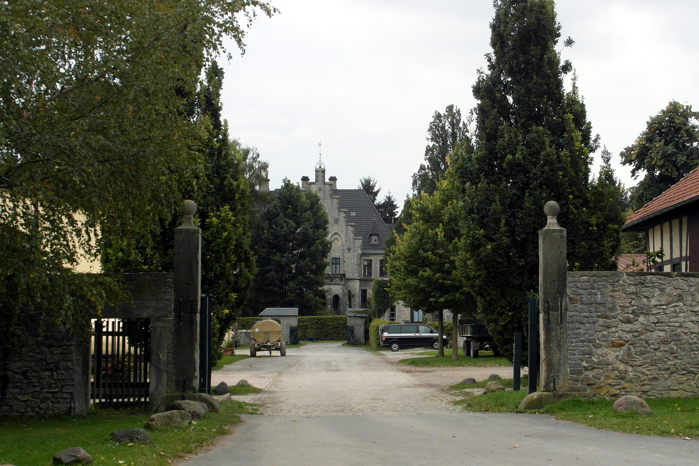 Blick von der Hannoverschen Straße im Springer Stadtteil Gestorf. Beidseitig Hofanlagen.Im Hintergrund Schloss Gestorf (Neustadstraße 14)